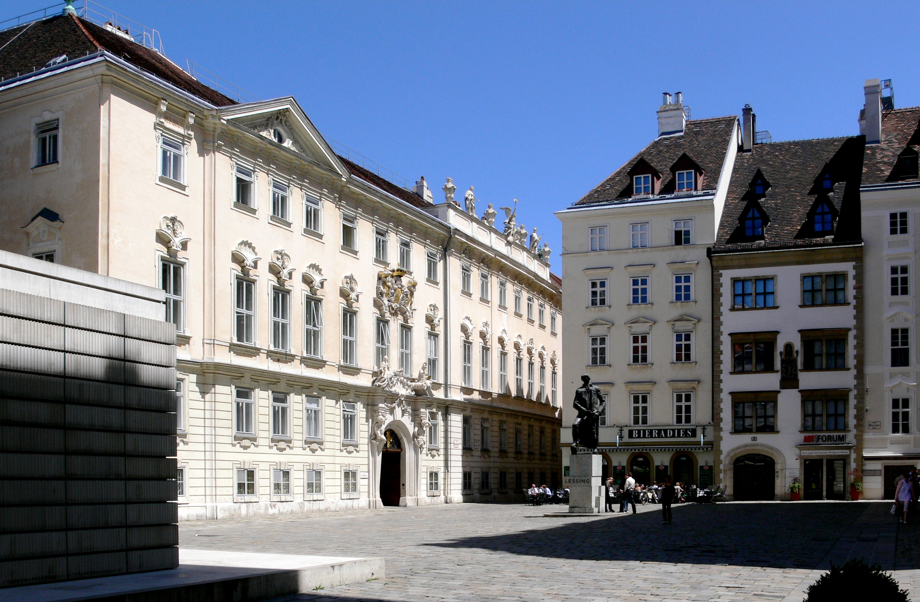 Wien, Judenplatz mit Lessingdenkmal und Holocaust-Mahnmal (ganz links) , links die Böhmische Hofkanzlei